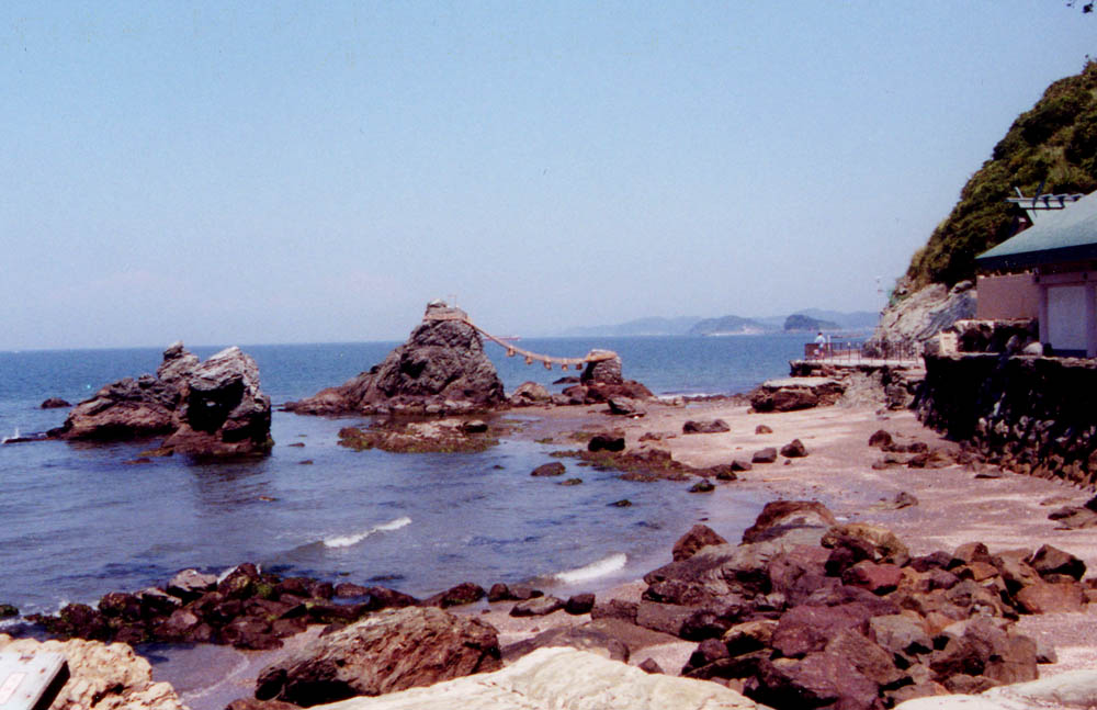 二見浦駅そばの二見浦にある夫婦岩。2001年本人撮影。